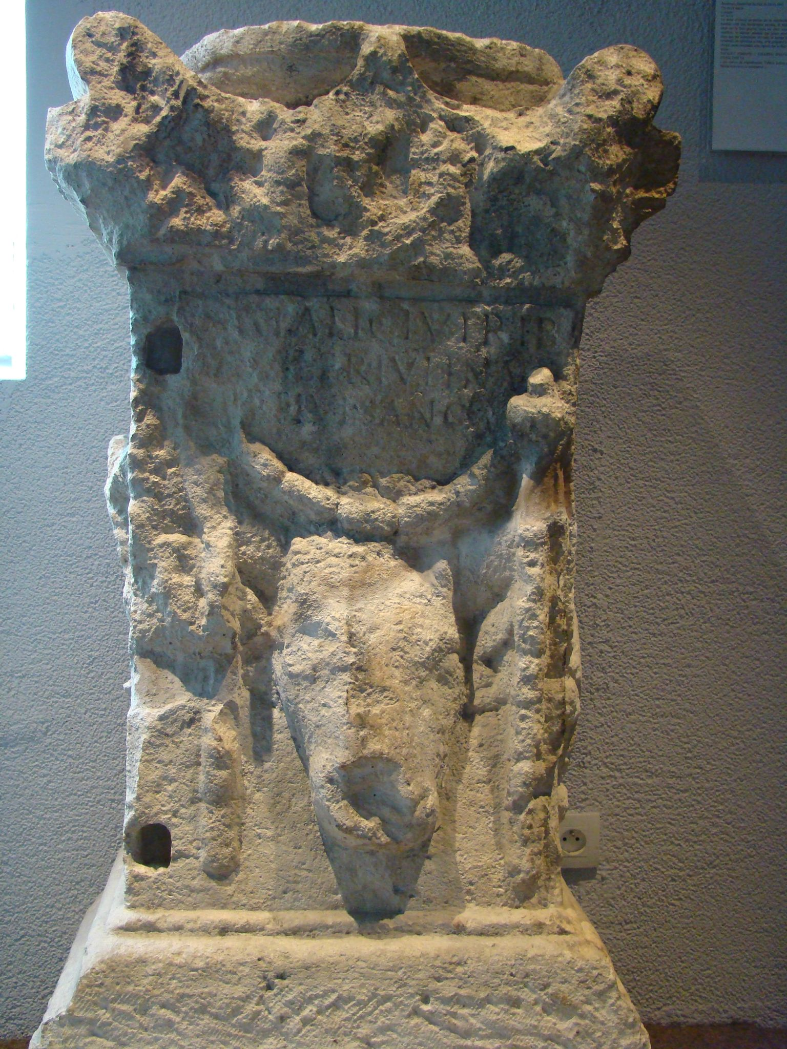 Autel taurobolique de Valeria Jullina et Julia Sancta, musée d’Aquitaine à Bordeaux